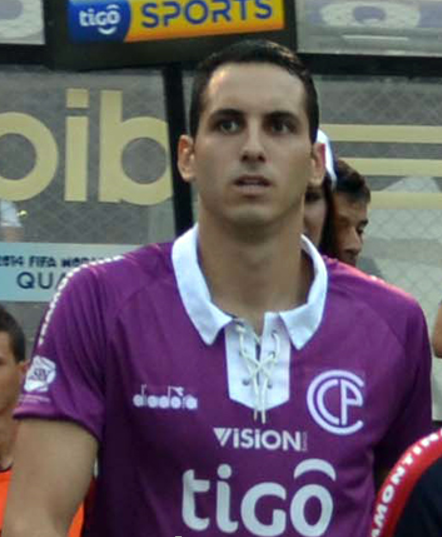 Roberto Júnior Fernández.